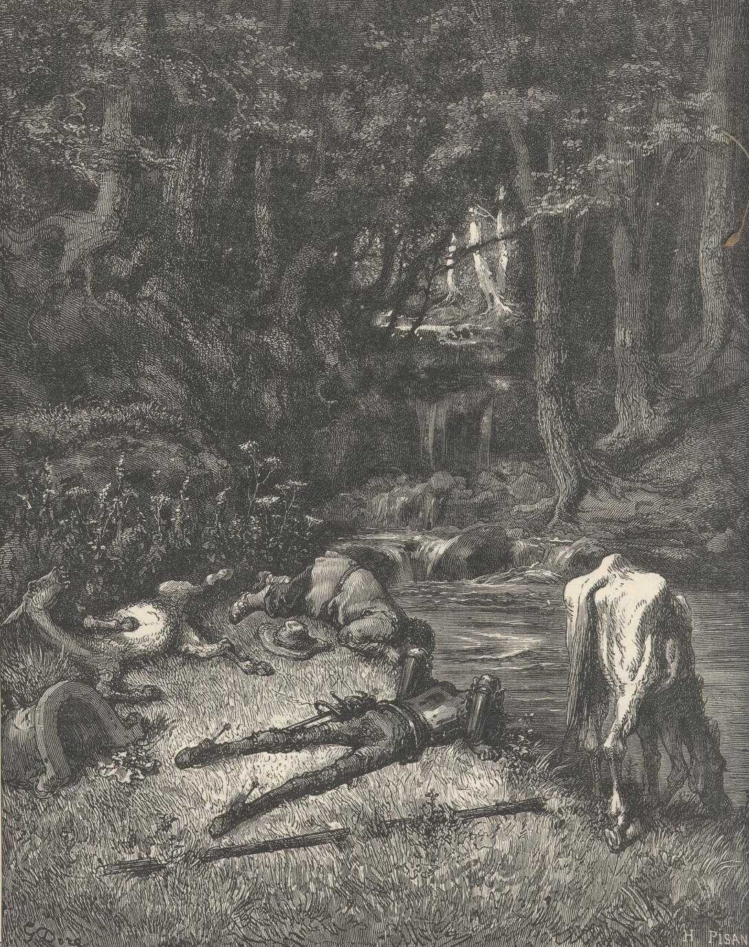 Dom Quixote, Sancho Pança e Rocinante-se bebem água no rio